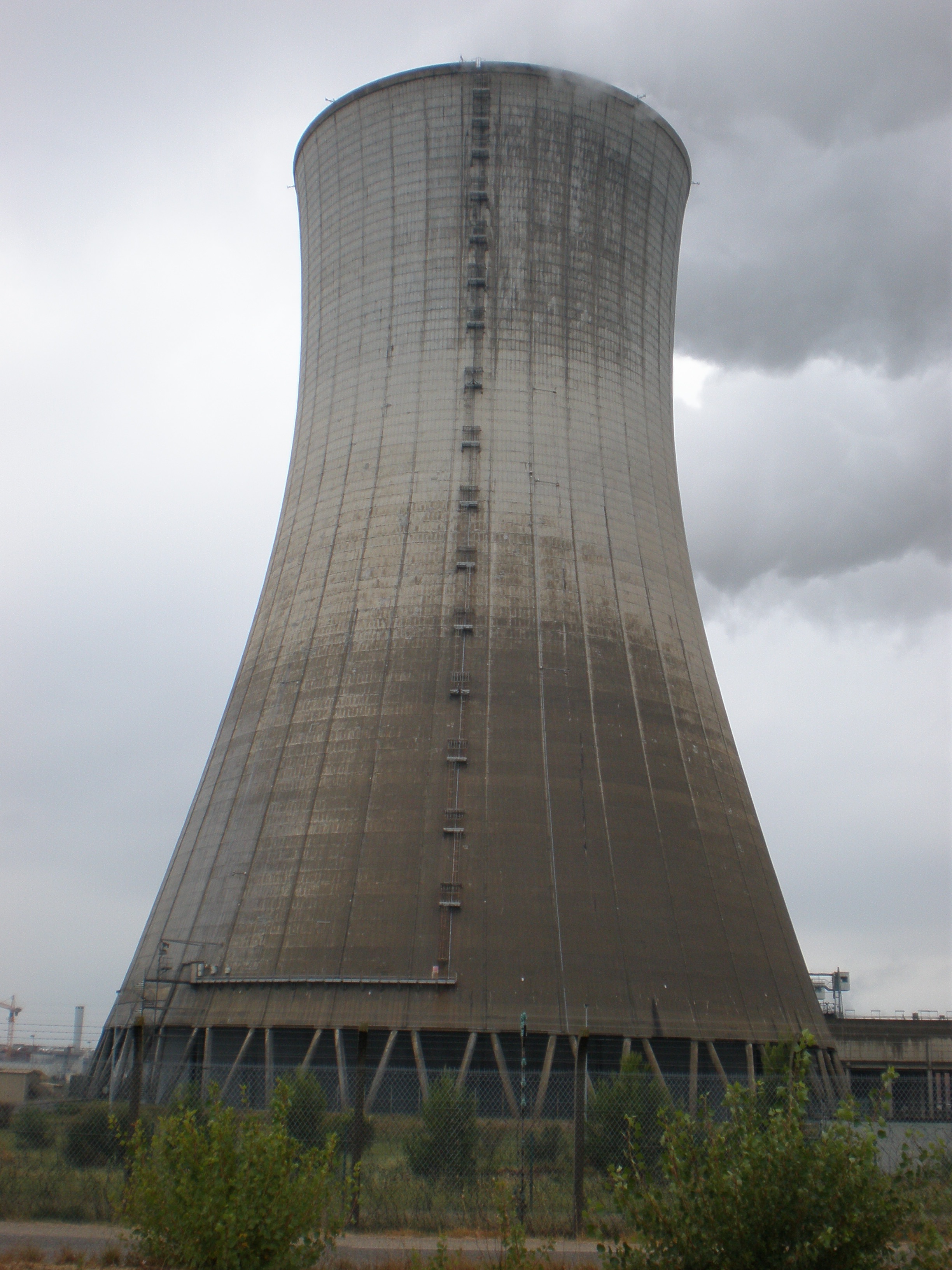 Tour Aéroréfrigérante (l'usine d'enrichissement Eurodif du Tricastin, France)